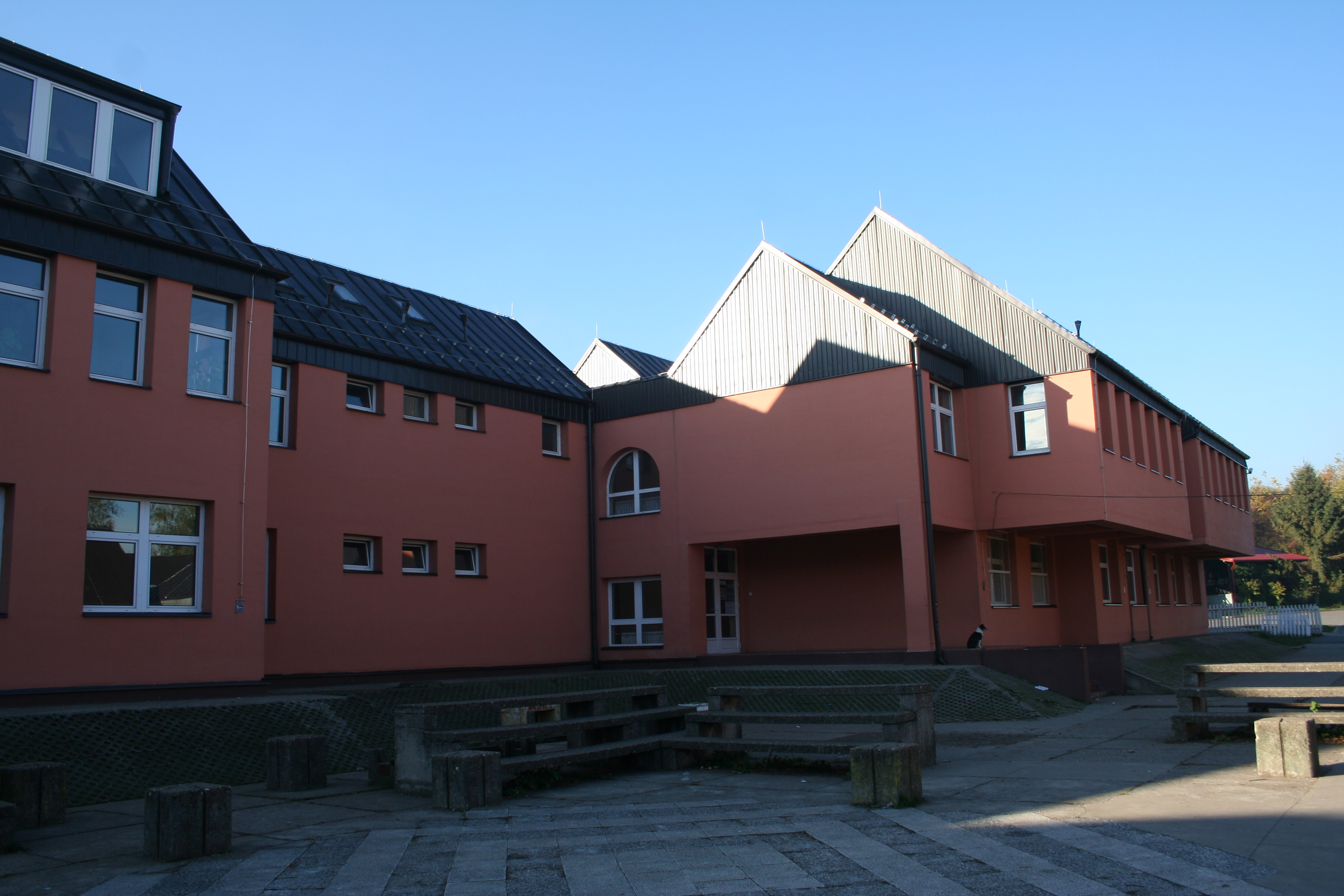 OŠ Nikolaj Velimirović Valjevo